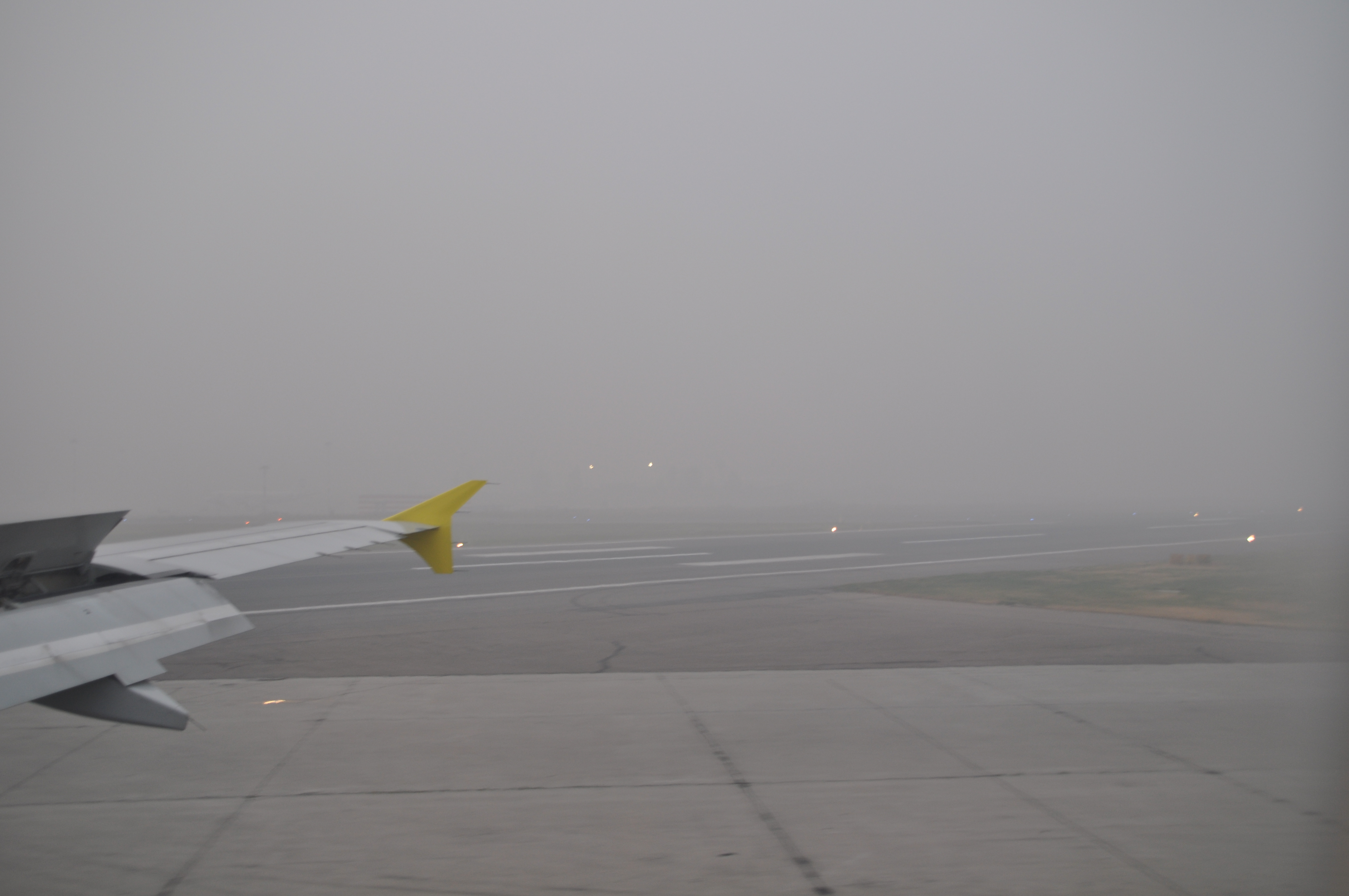 Rauch bedingt durch die Wald- und Torfbrände am Flughafen in Moskau (Flughafen Moskau-Domodedowo) am 6. August 2010